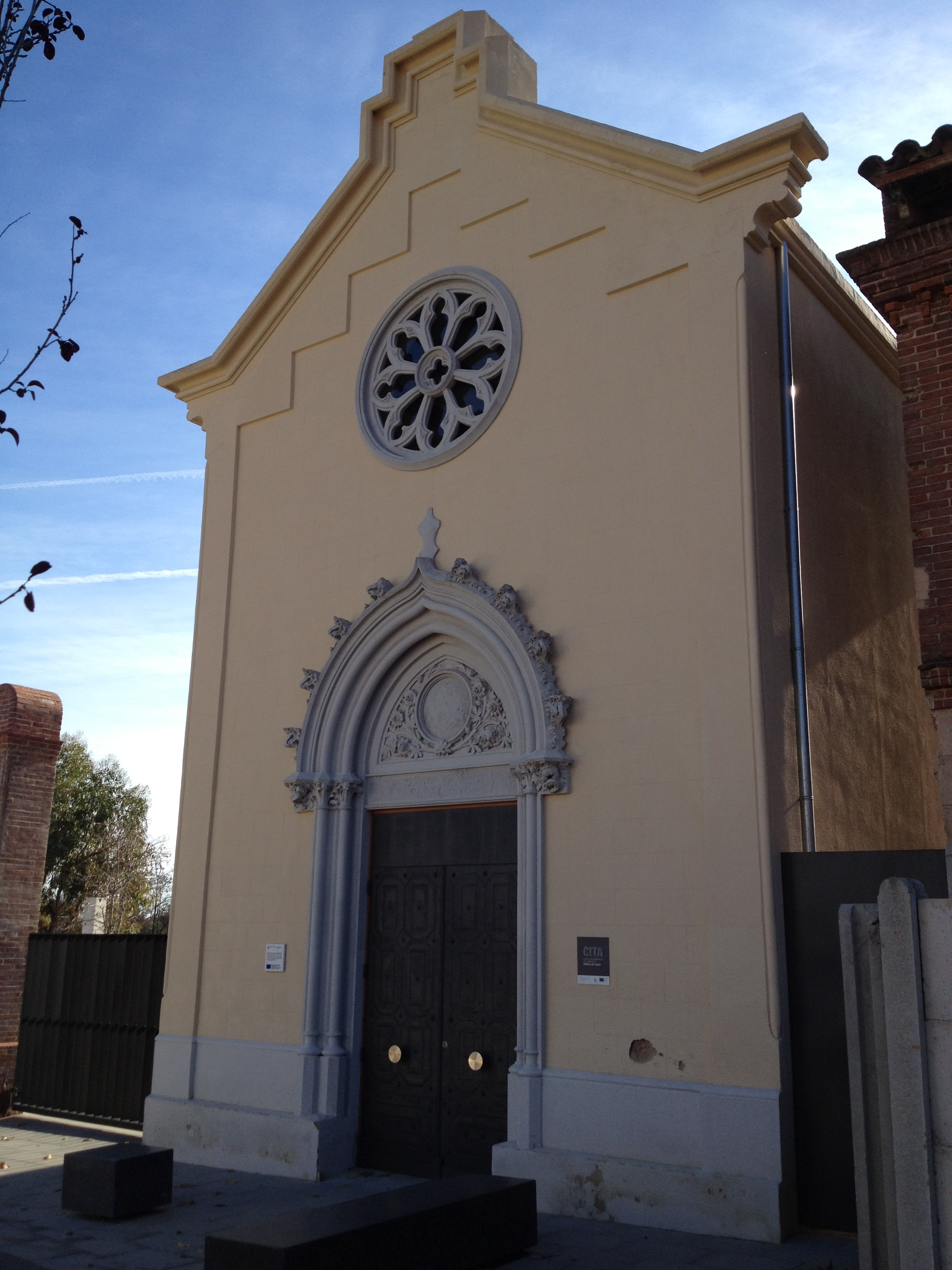 Capella neogòtica de l'antiga Masia de Can Camp (Ametlla del Vallès)